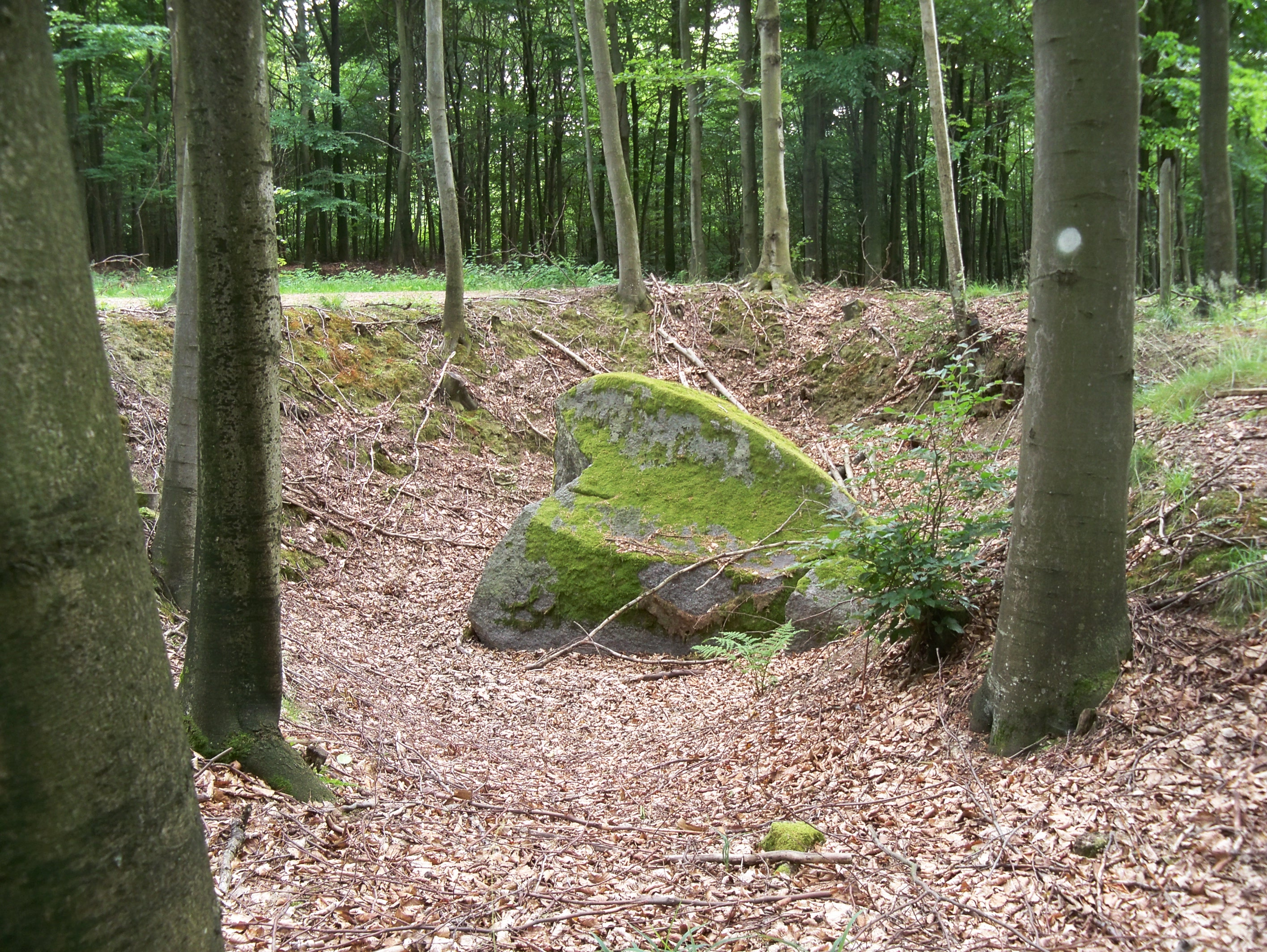 Głaz narzutowy - pomnik przyrody - pod Smęcinem w Gminie Tychowo.